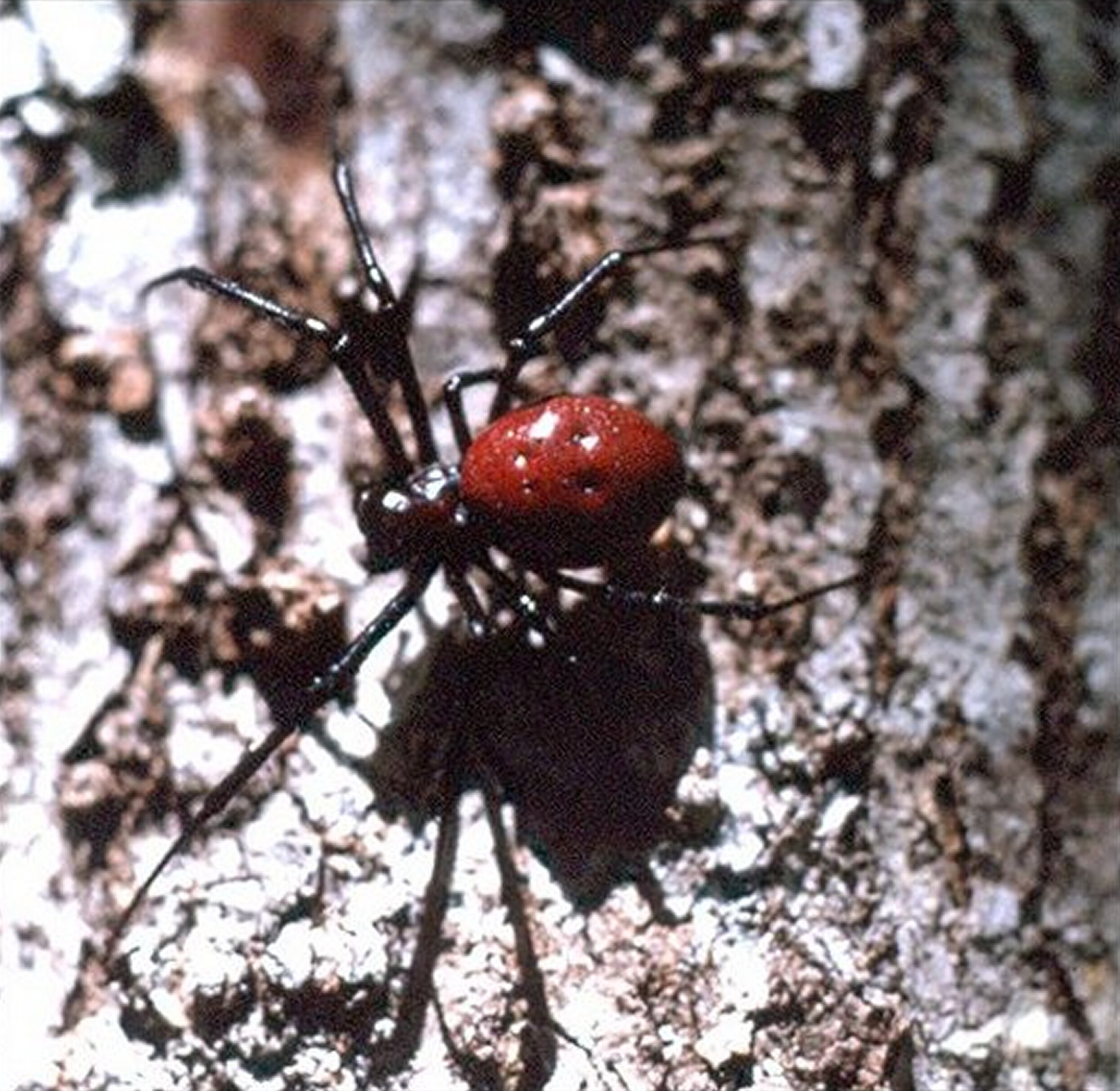 Nephilengis borbonica, femelle adulte,vue dorsale.Sur un tronc d'arbre, forêt du Grand Matarum, Cilaos, île de la Réunion. Autre vue.